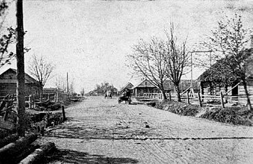 Деревня Калливиере